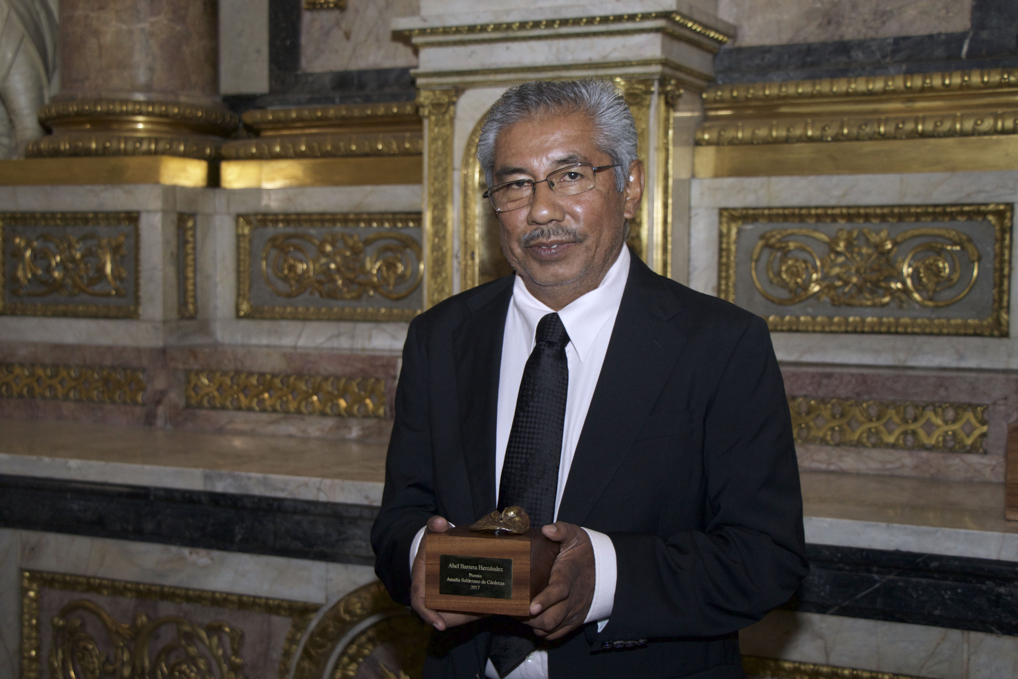 Jueves 12 de octubre de 2017. En el Palacio de Minería, se hizo entrega del Premio Amalia Solórzano de Cárdenas 2017, al antropólogo Abel Barrera Hernández, fundador del Centro de Derechos Humanos de la Montaña de Tlachinollan, Guerrero. En la entrega participó el ingeniero Cuauhtémoc Cárdenas Solórzano, Cuauhtémoc Cárdenas Batel, Adolfo Gilly, como parte del Consejo del premio. Al acto acudió como invitado Eduardo Vázquez Martín, secretario de Cultura de la CDMX Fotografía: Milton Martínez / Secretaría de Cultura CDMX. Jueves 12 de octubre de 2017. En el Palacio de Minería, se hizo entrega del Premio Amalia Solórzano de Cárdenas 2017, al antropólogo Abel Barrera Hernández, fundador del Centro de Derechos Humanos de la Montaña de Tlachinollan, Guerrero. En la entrega participó el ingeniero Cuauhtémoc Cárdenas Solórzano, Cuauhtémoc Cárdenas Batel, Adolfo Gilly, como parte del Consejo del premio. Al acto acudió como invitado Eduardo Vázquez Martín, secretario de Cultura de la CDMX Fotografía: Milton Martínez / Secretaría de Cultura CDMX.